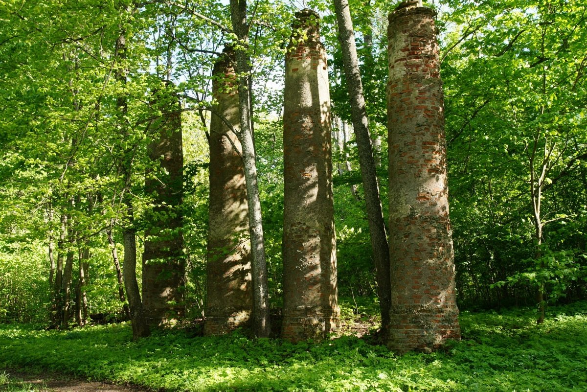 Сітцы. Сядзіба Дамейкаў